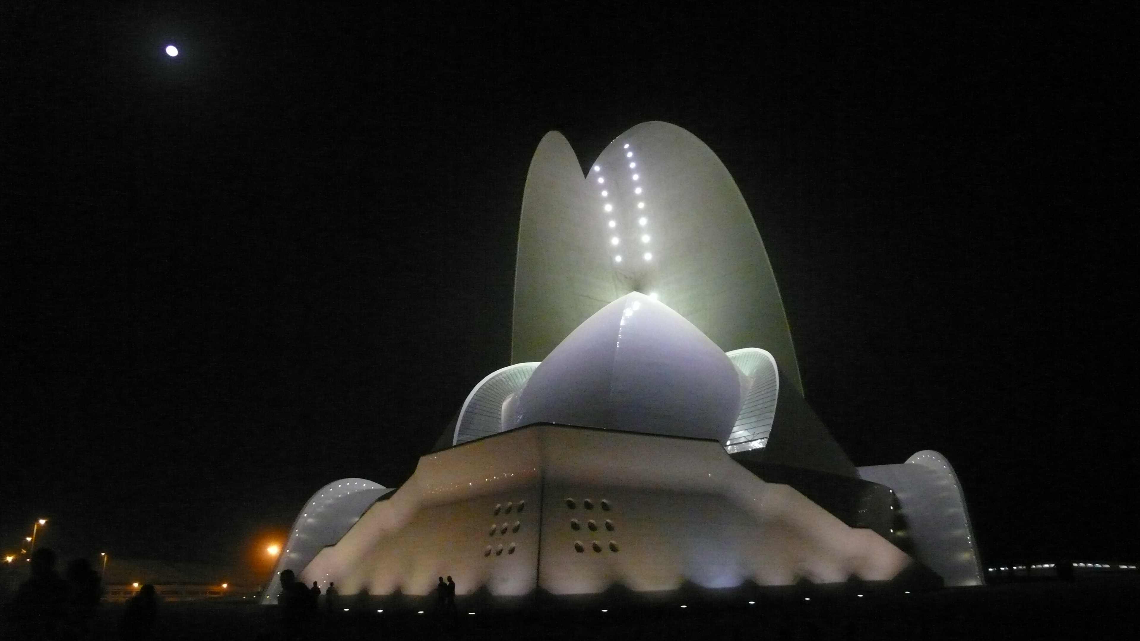 Auditorio de Tenerife de noche